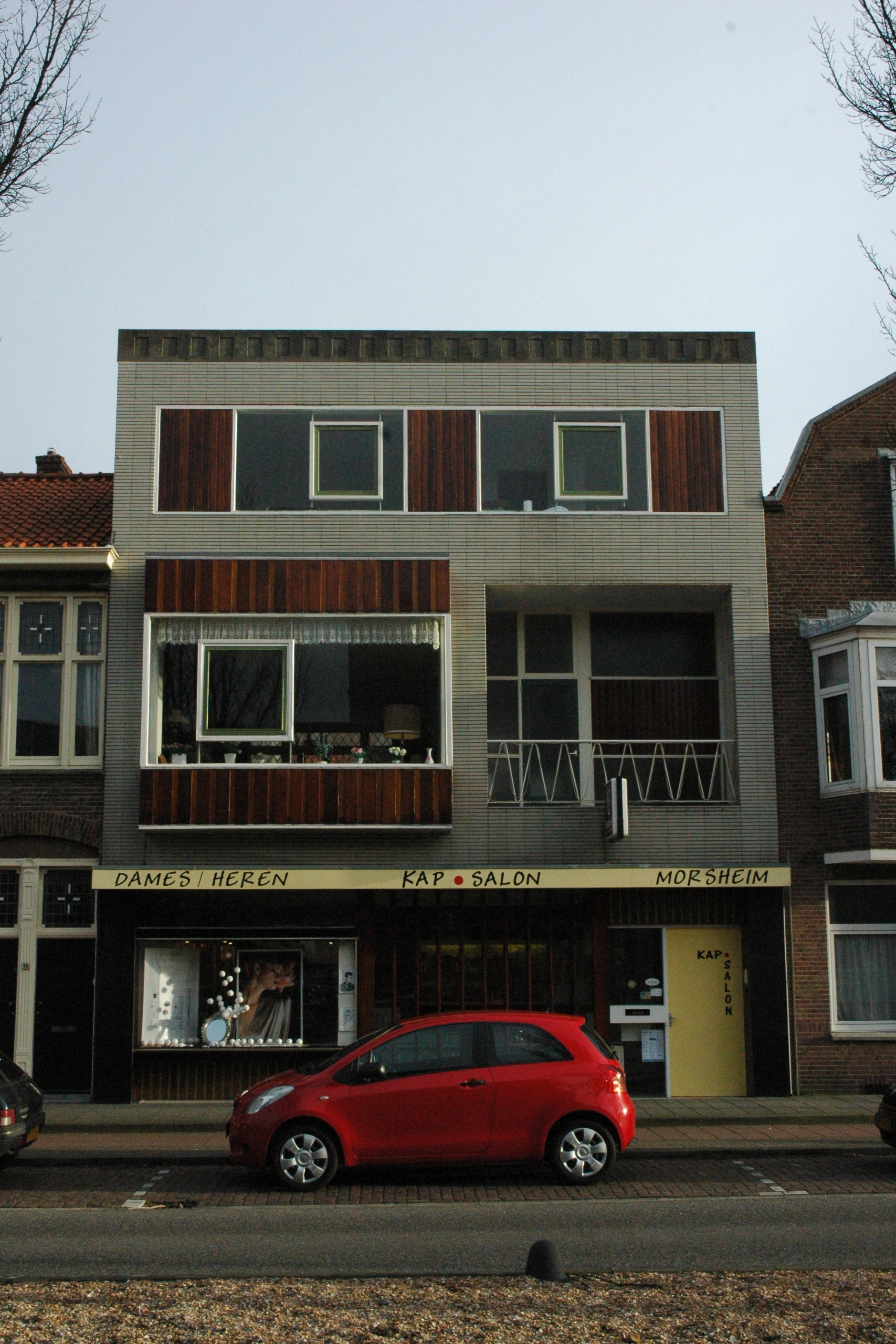 De voorgevel van kapperszaak Morsheim in de Vlissingse Paul Krugerstraat, ontworpen door architect Piet Götzen.